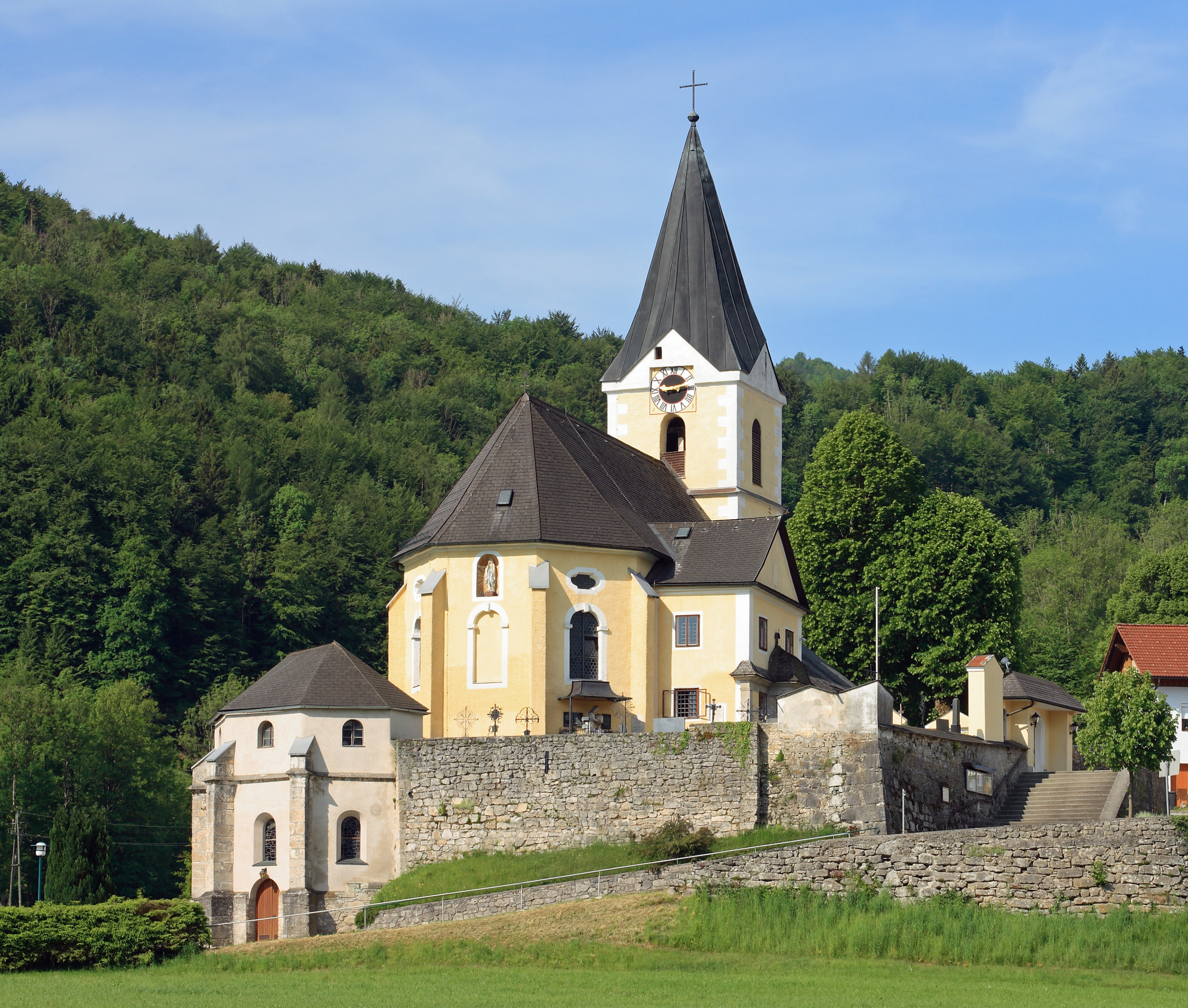 Die Leonsteiner Pfarrkirche (Gemeinde Grünburg)